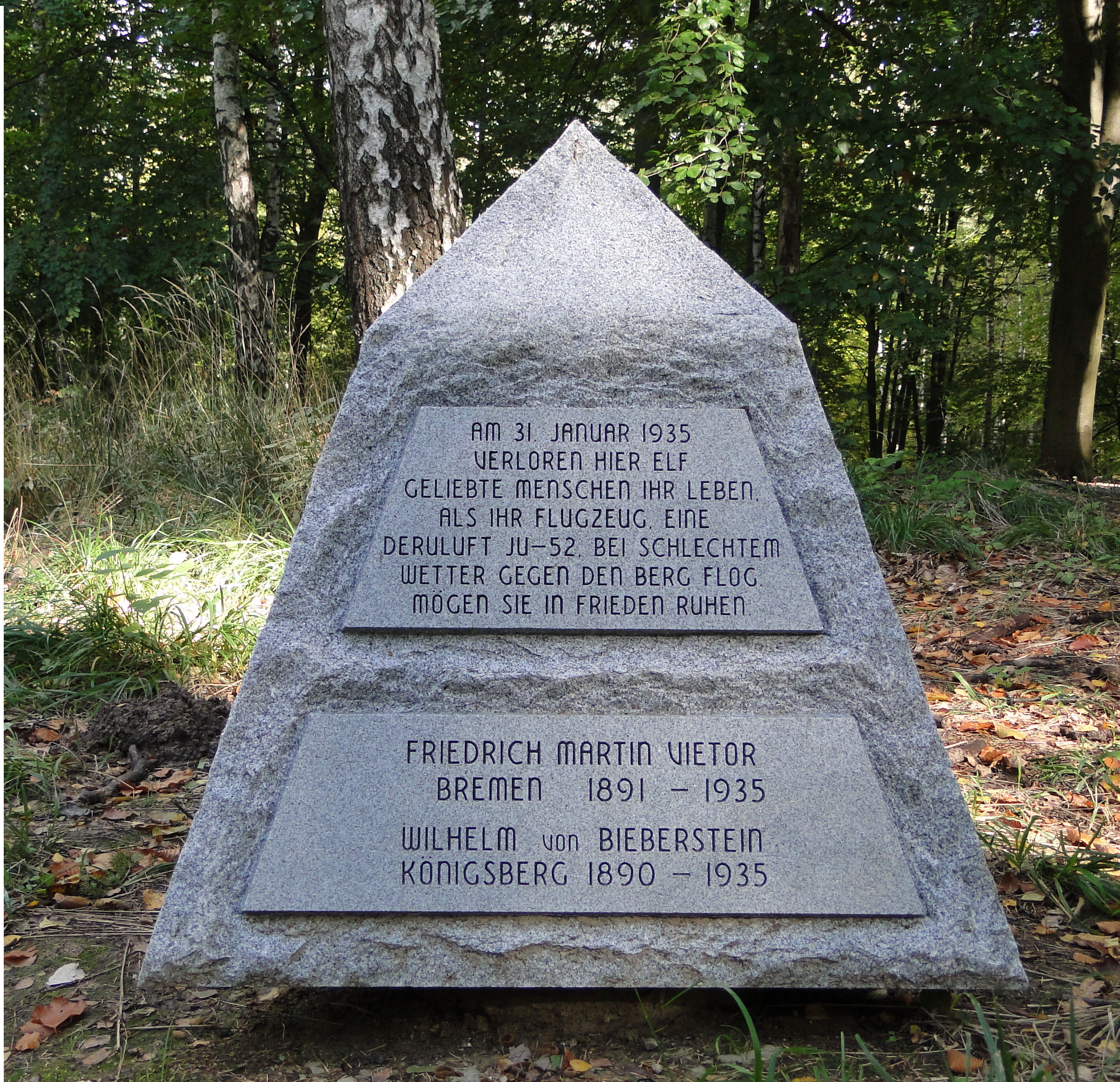 Pomnik ofiar katastrofy lotniczej 31.01.1935 pod Bukowcem koło Szczecina.